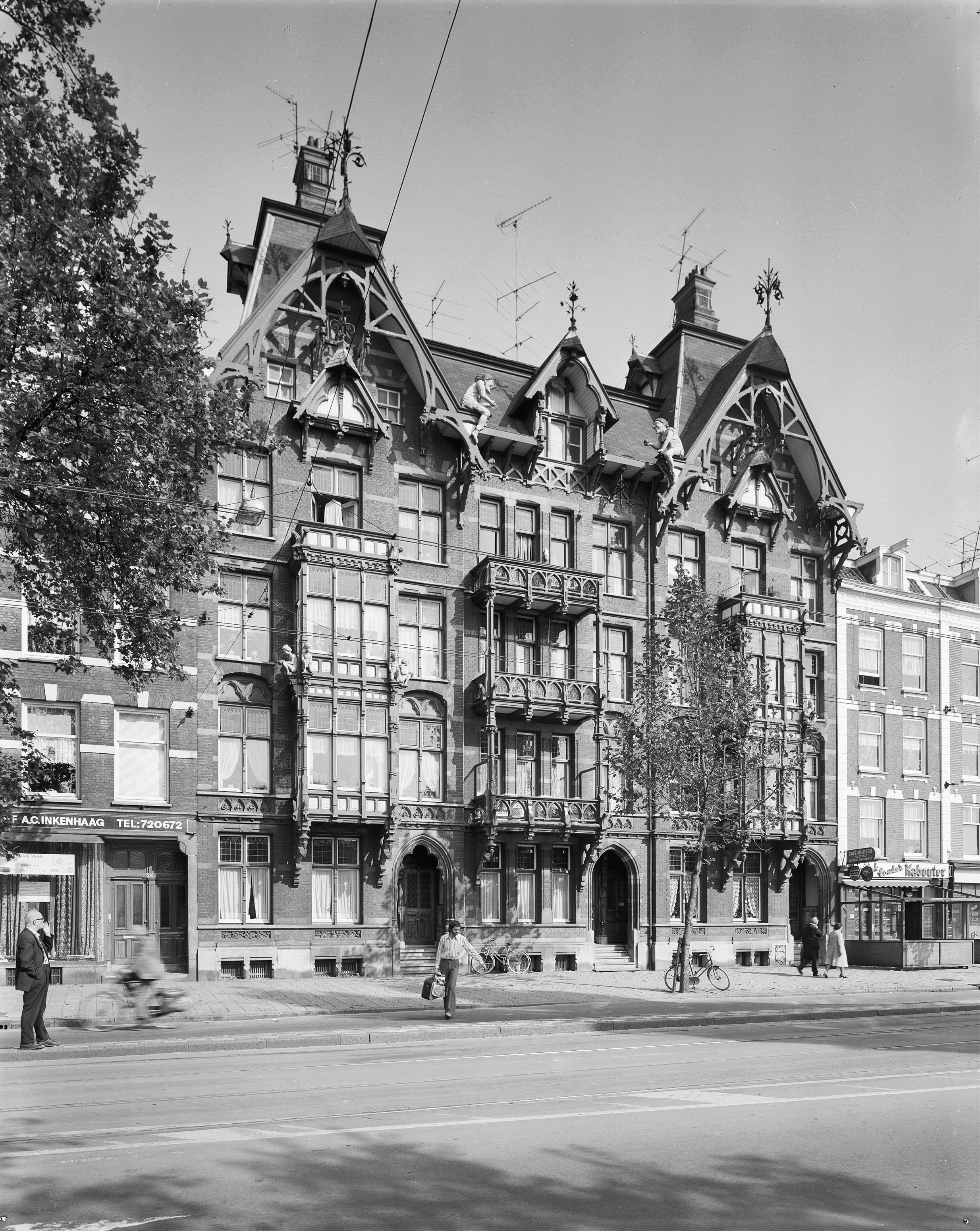 voorgevels